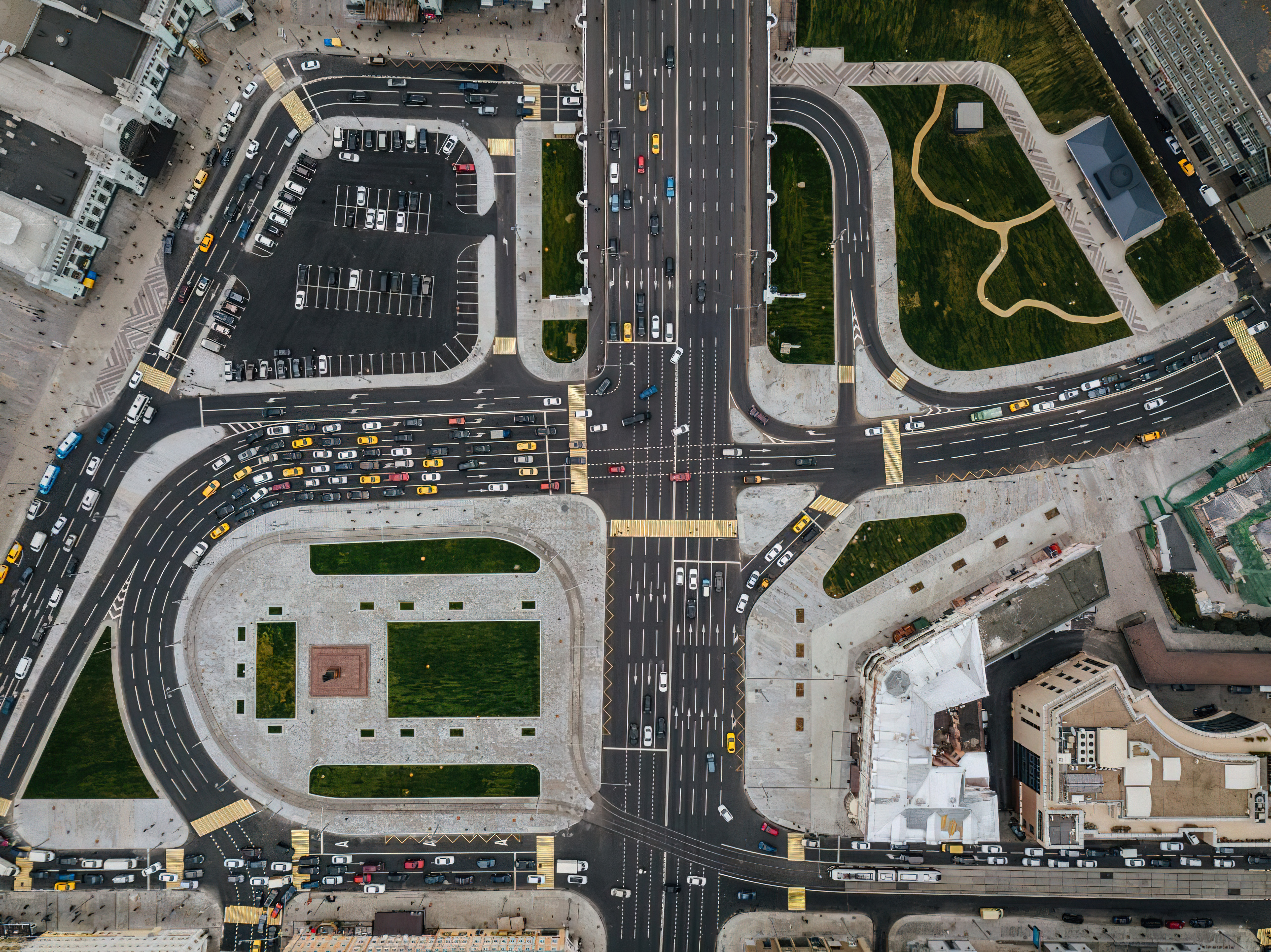 Площадь Тверская Застава (вид сверху)